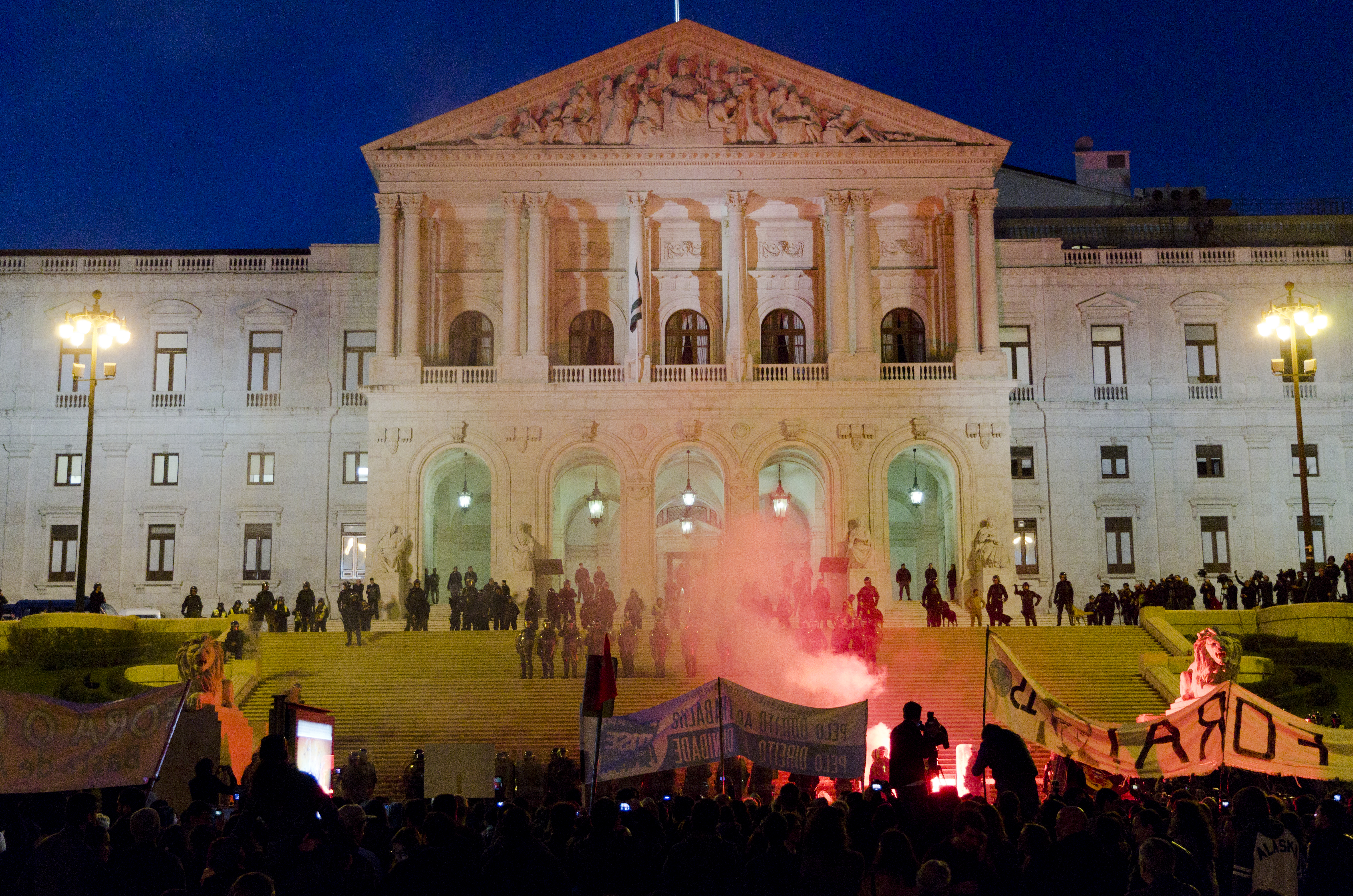 LISBOA_20121114_1281_ps